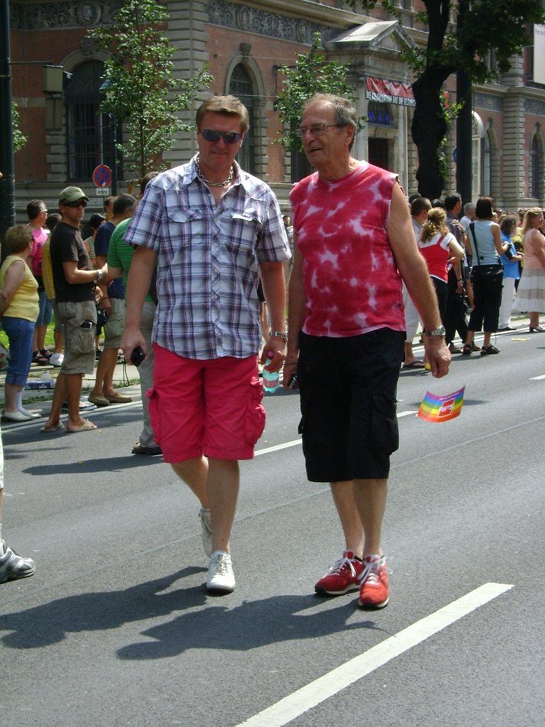 Günter Tolar mit Partner